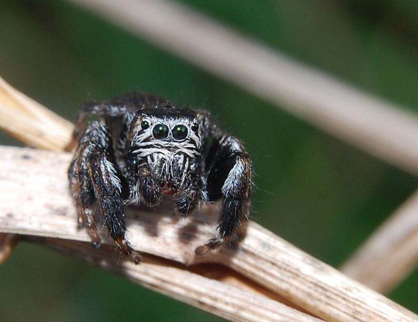 Evarcha arcuata, male